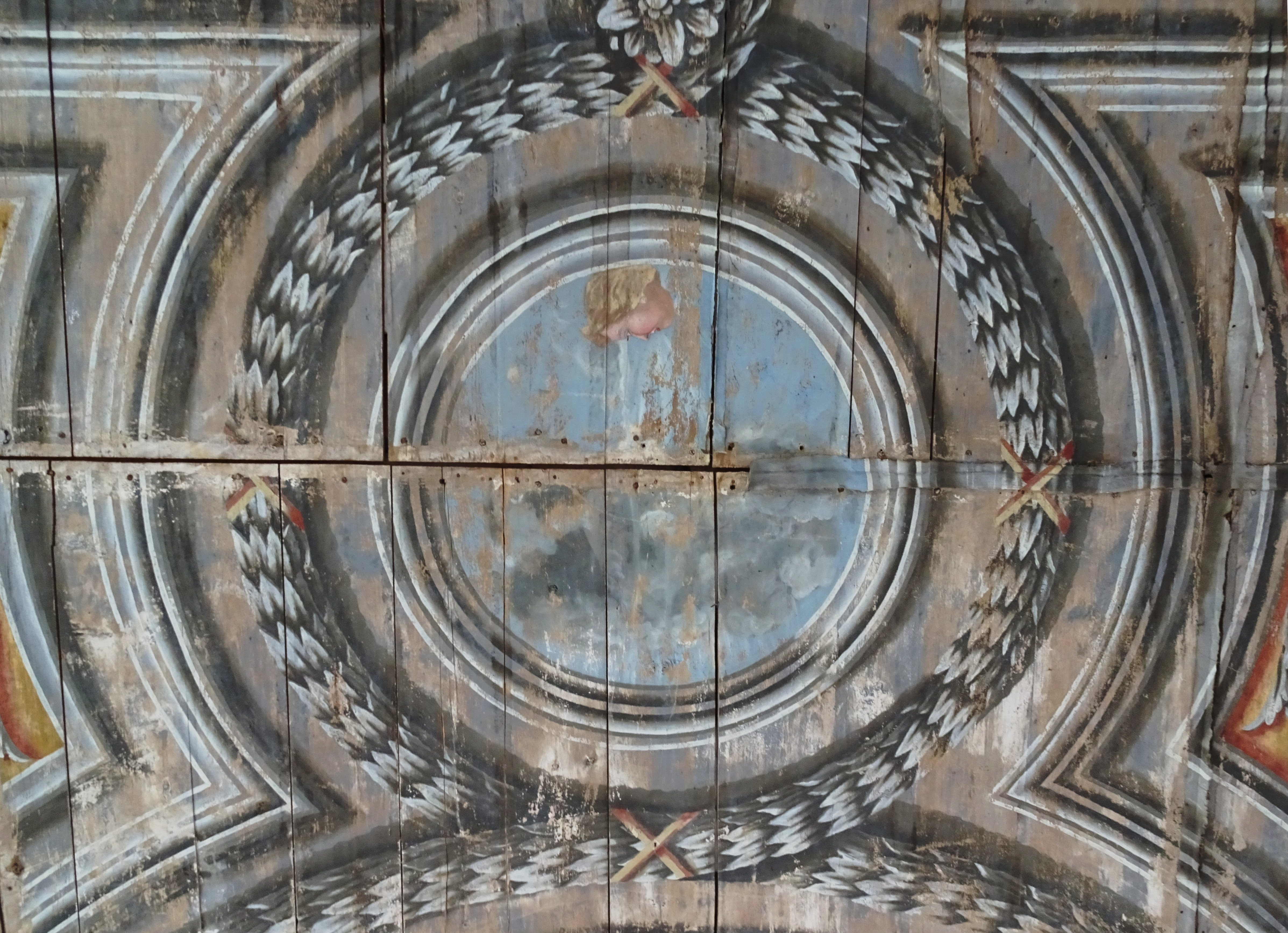 Bogesund interiör, takmålning i festsalen från 1669